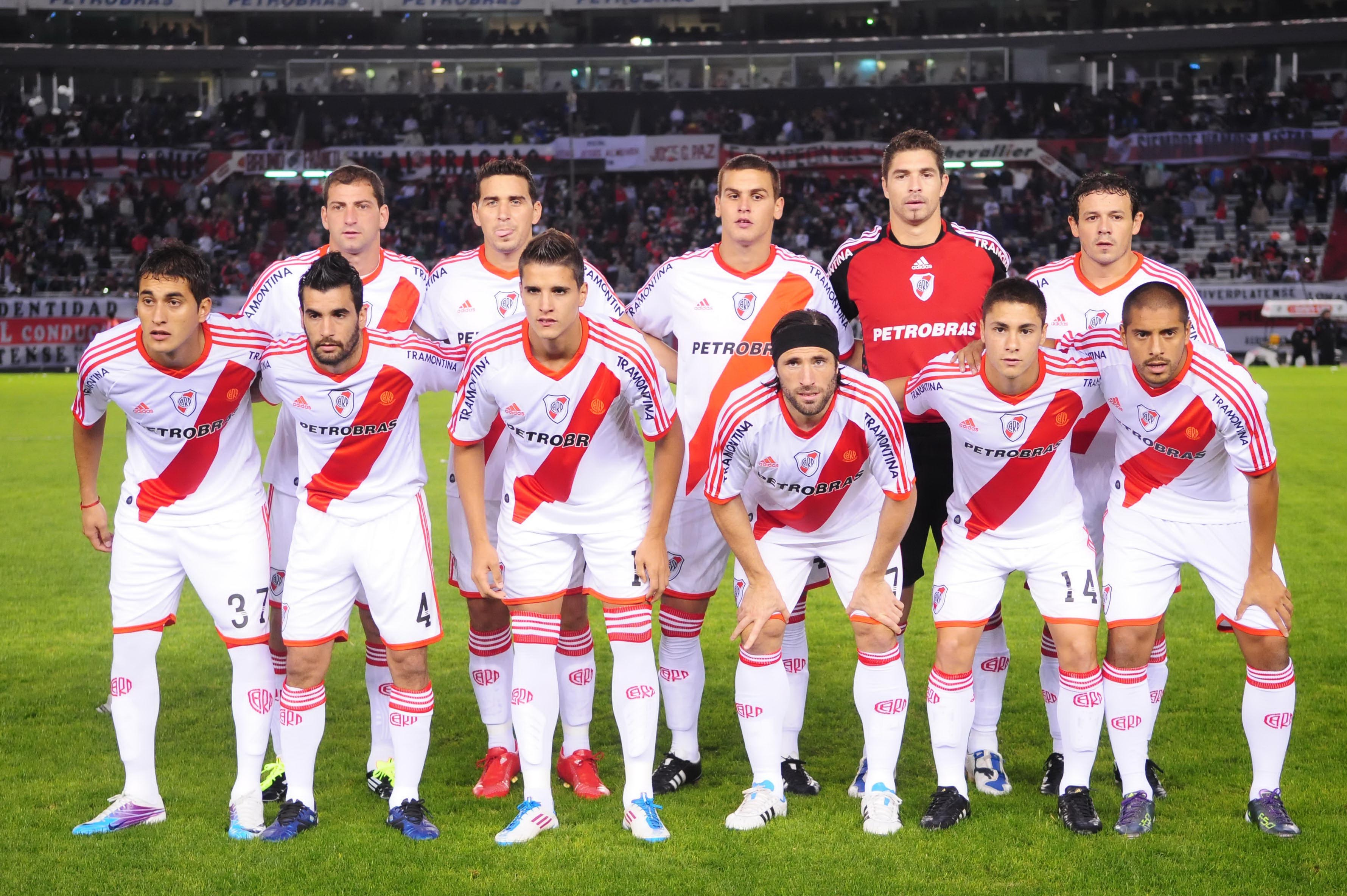 Una formación del equipo de River Plate en la temporada 2011/12, cuando descendió a la Primera B Nacional, segunda división del fútbol argentino, por primera vez en su historia, luego de caer en la serie eliminatoria de la Promoción ante Belgrano de Córdoba.